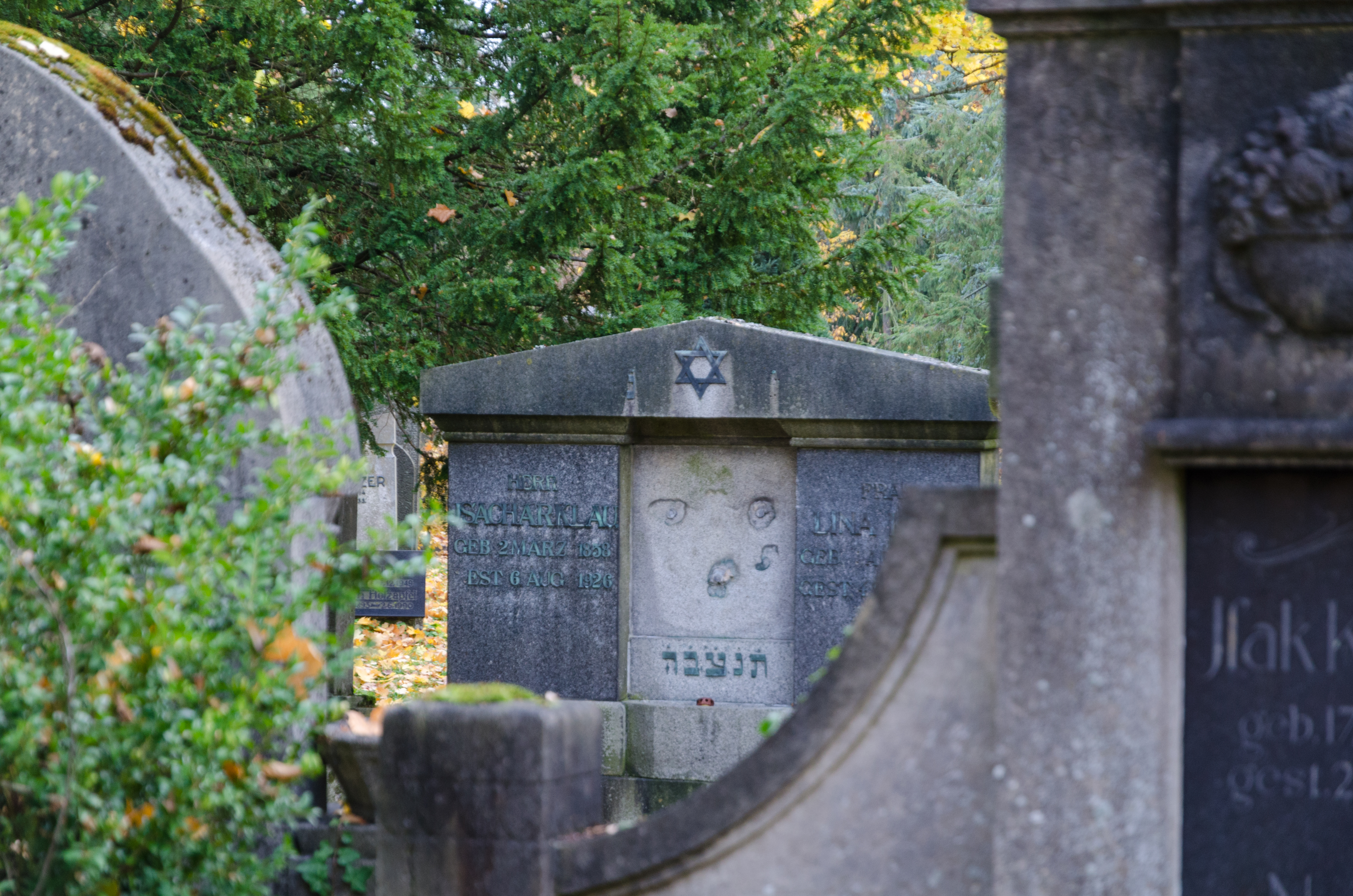 Schweinfurt, Hauptfriedhof, Jüdische Abteilung